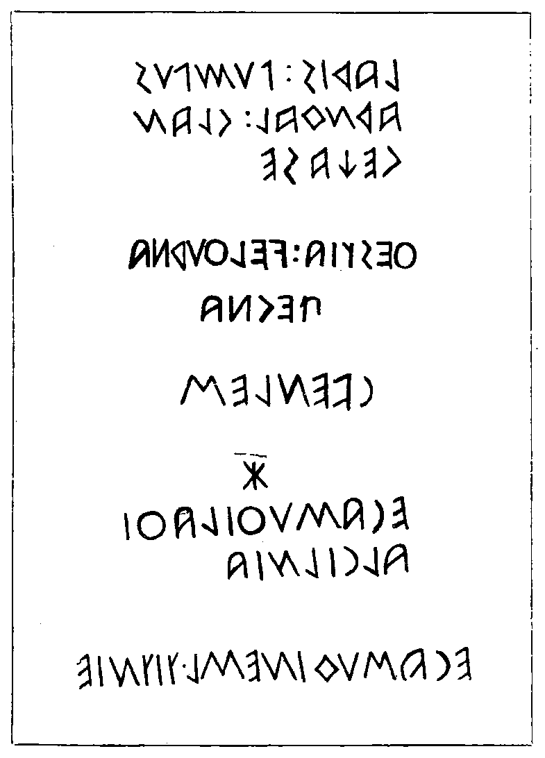 inscriptions étrusques LARIS PUMPUS ARNTHAL CLAN CECHASE THESTIA VELTHURNA NECNA CVENLES ECA SUTHI LATHI ALSILNIA ECA SUTHI NESL TITNIE